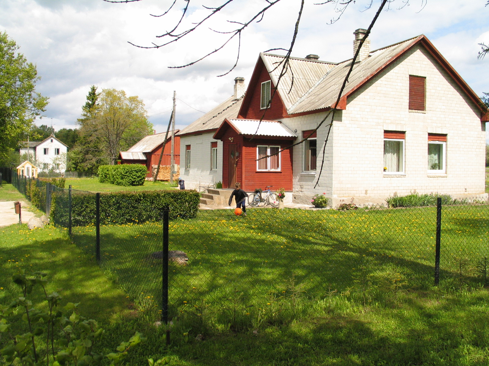 Järva-Jaani jaamahoone